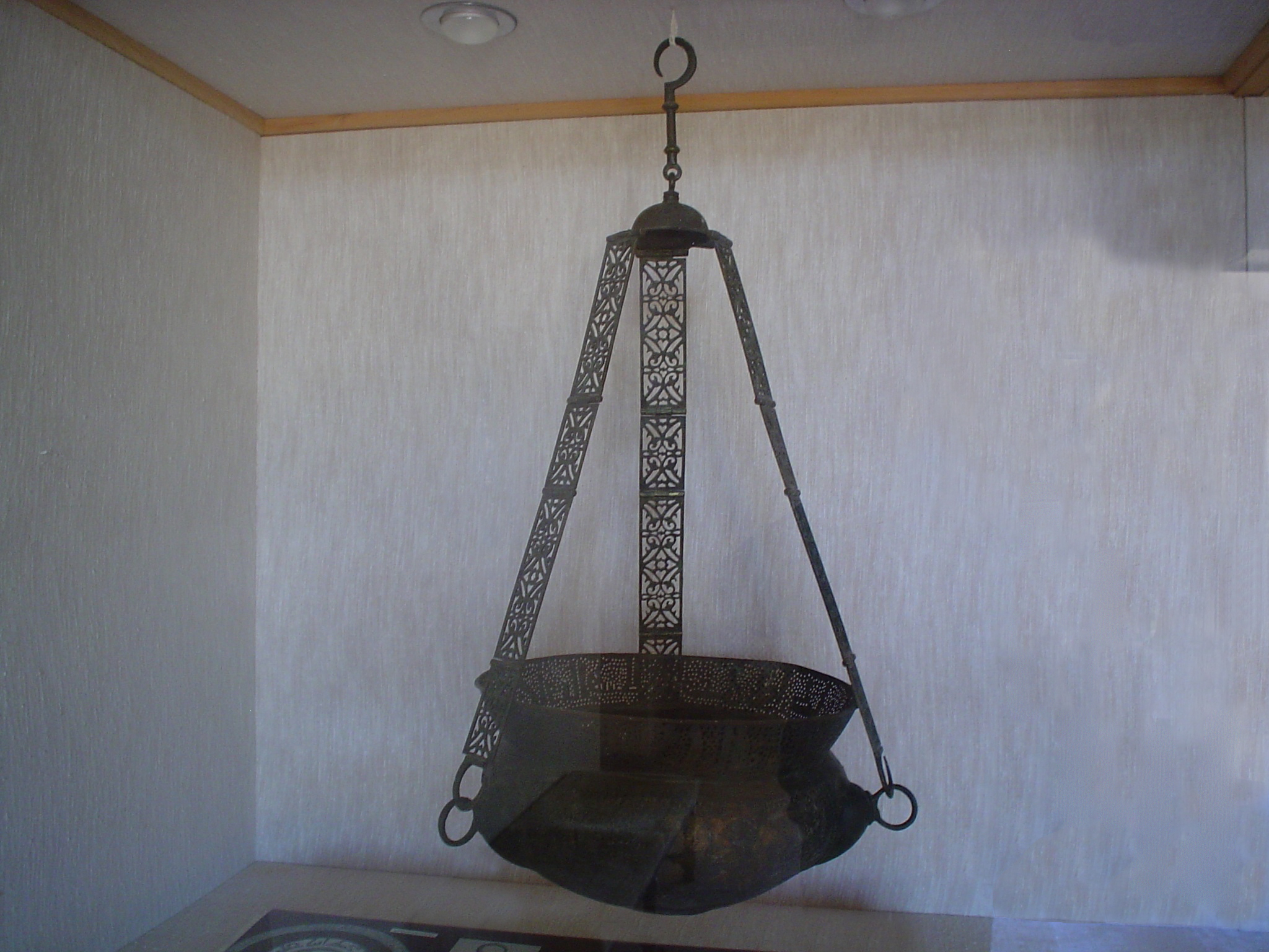 Lanterne d’al-Muizz, musée national d'art islamique de Raqqada, Kairouan, Tunisie.